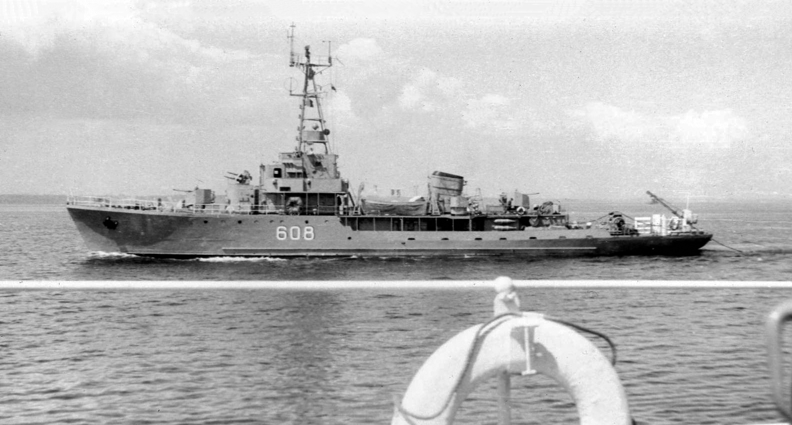 ORP Delfin.